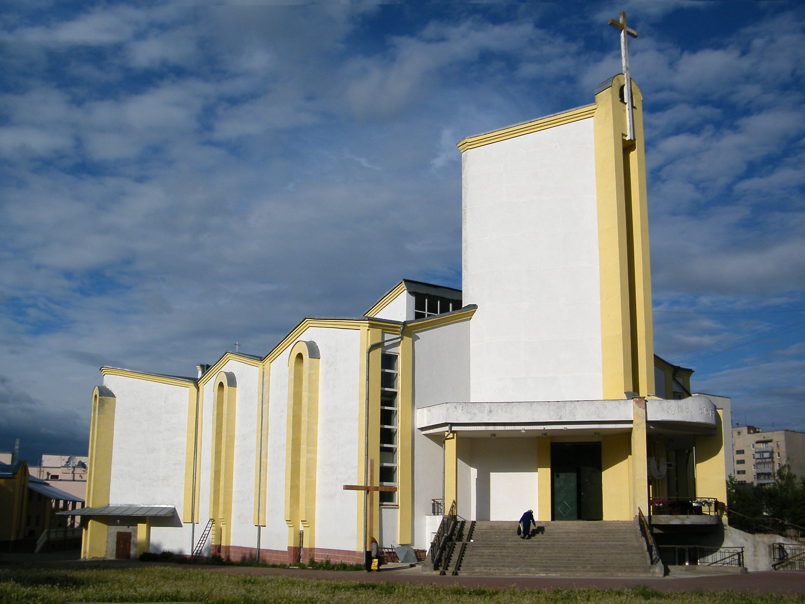 Костёл Крови Христа